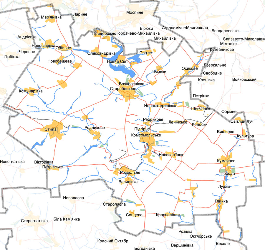 Map